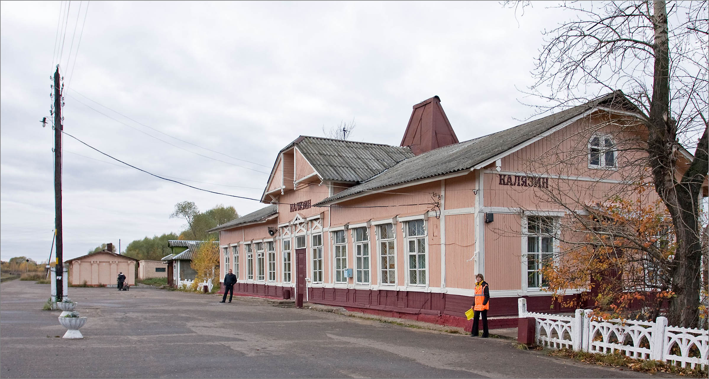 Kalyazin railroad station / Kalyazin, Russia